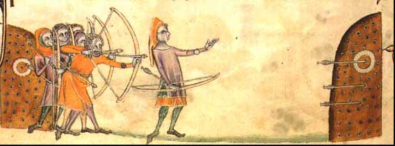 Entrainement des archers gallois: Psalm 79; archery practice